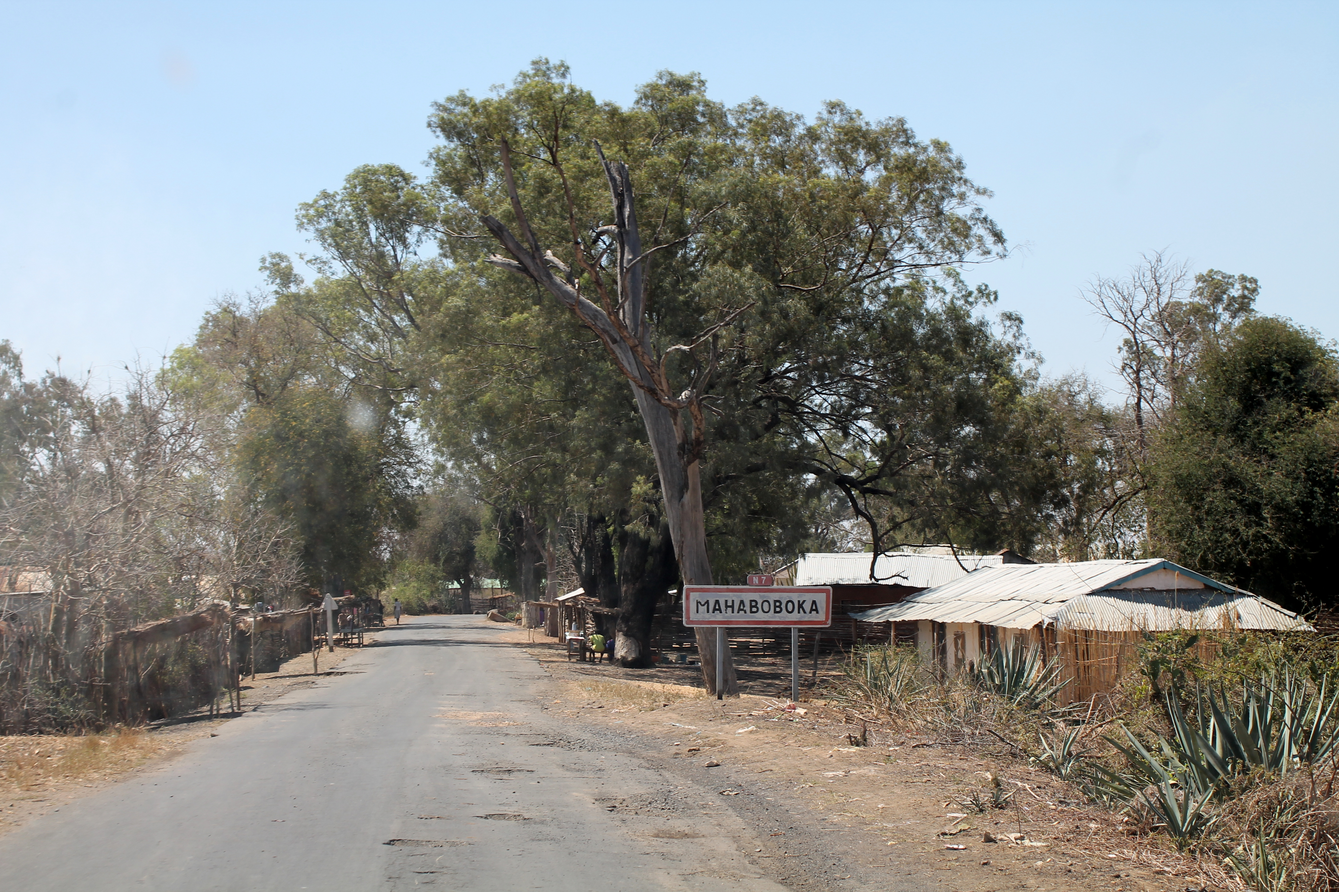 Mahaboboka